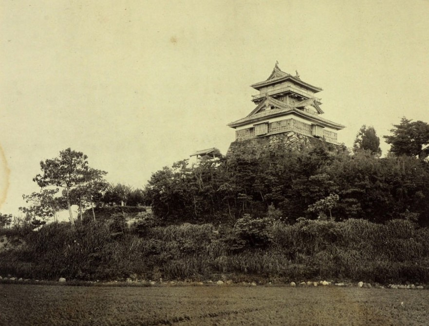 『越山若水』1910年収載。加藤竹雄家文書A0052-01441 福井県文書館蔵